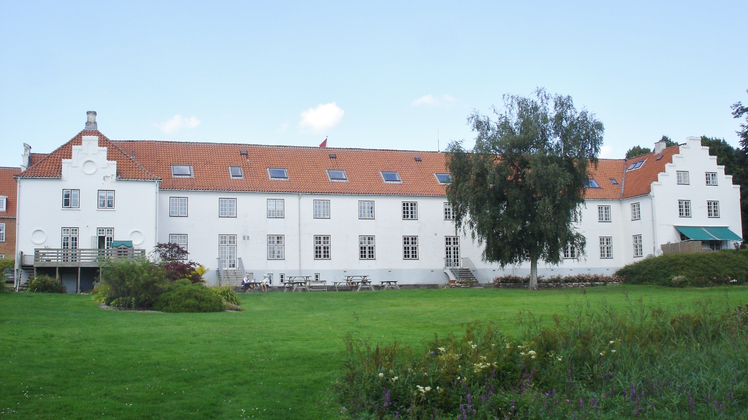 Uddannelsescenter Søgårdlejren, hovedbygningen fra 1935 på den gamle sokkel